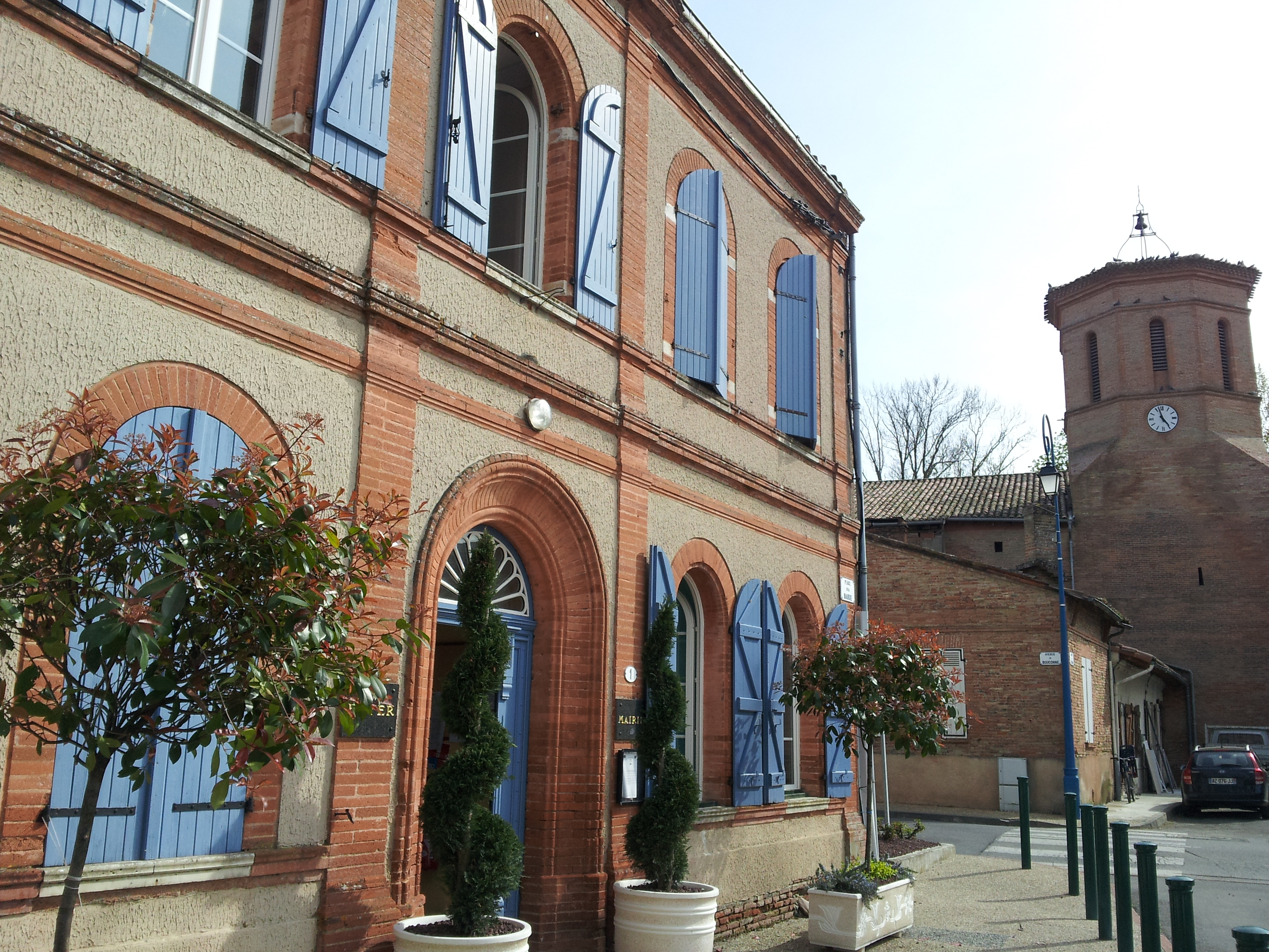 Mairie et église de Lasserre (Haute Garonne, Midi-Pyrénées, France).